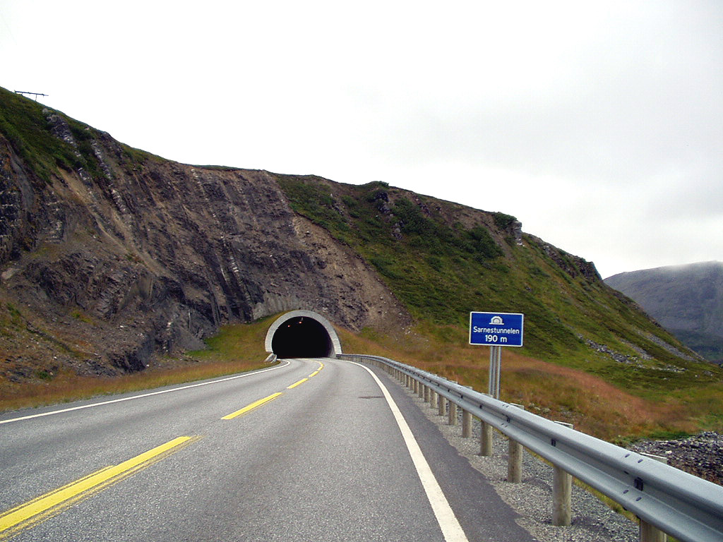 Sarnestunnelen på Magerøya.